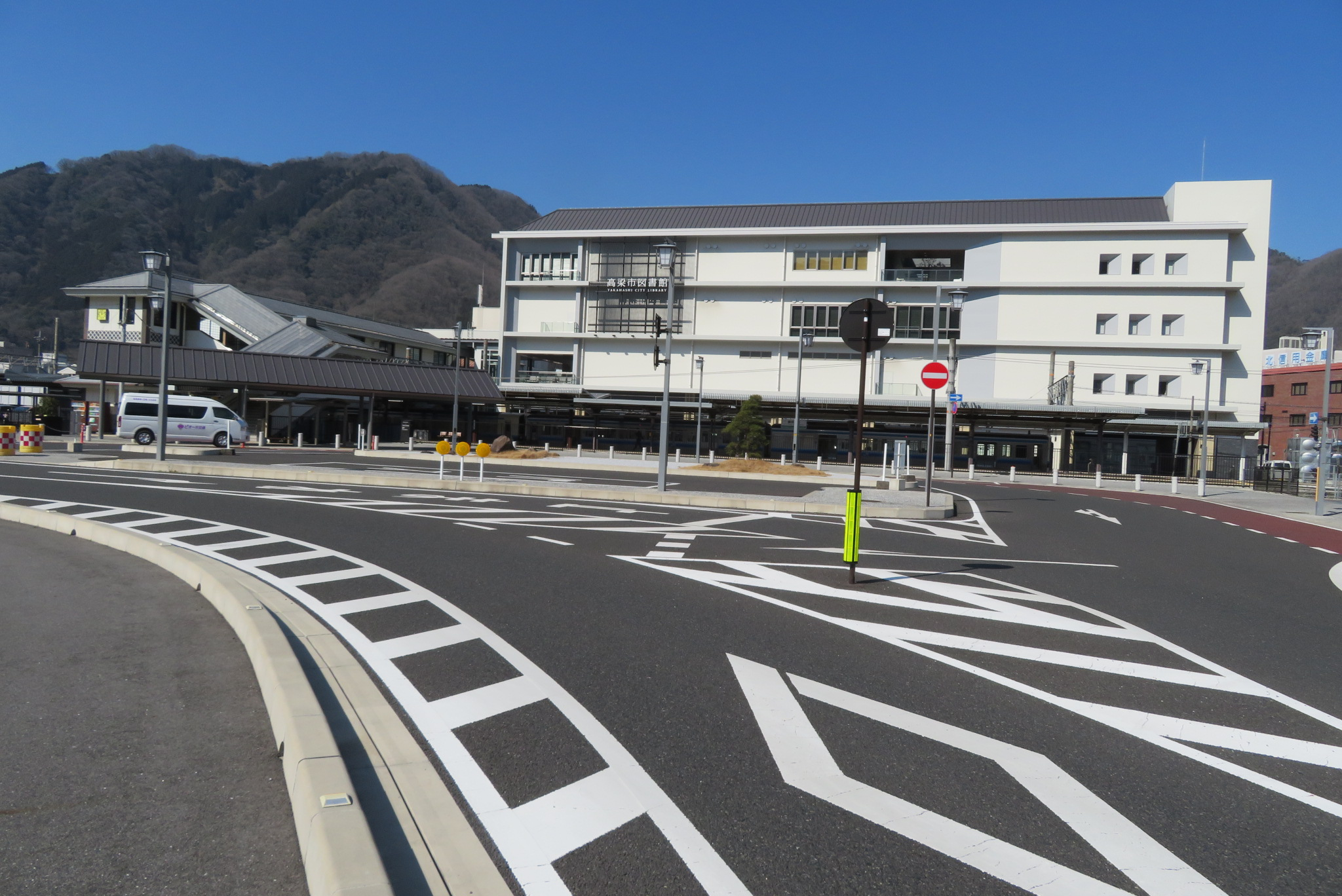 備中高梁駅東口駅前広場